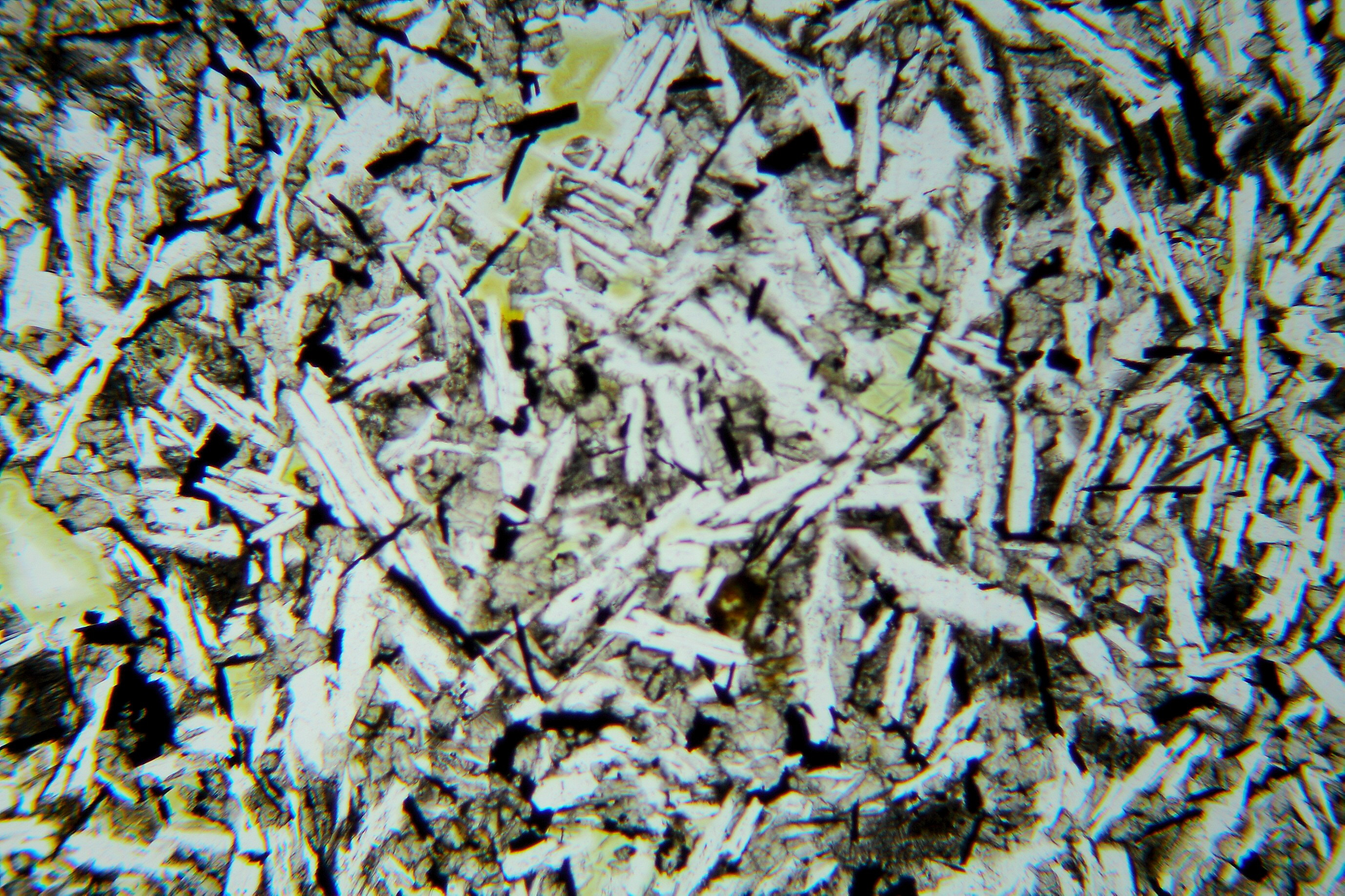 Tholeiitischer Basalt im Dünnschliff (LPL)